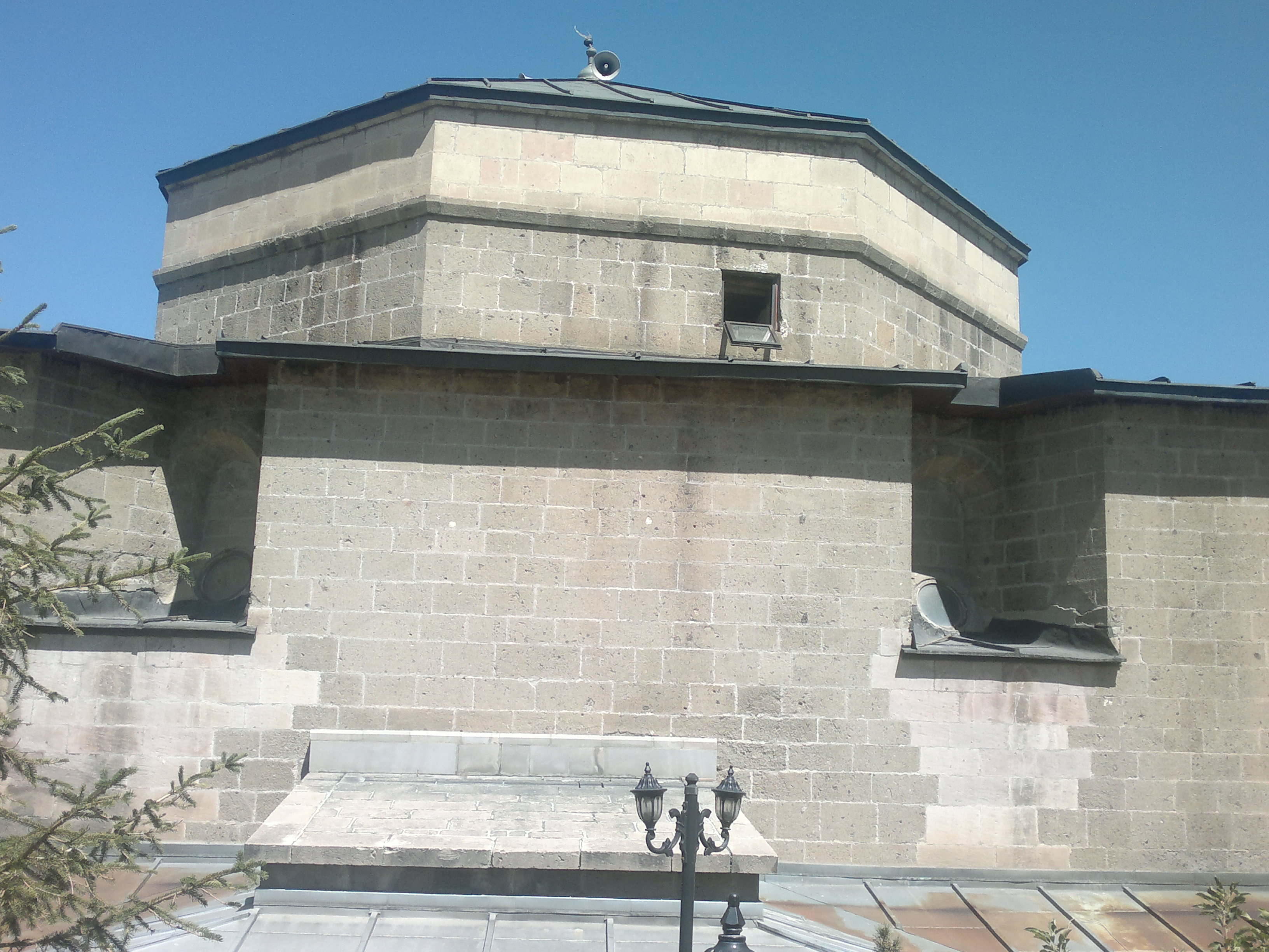 Erzurum Ulu Camii Kırlangıç Kubbe ve Fil gözü pencerelerin dış görünümü